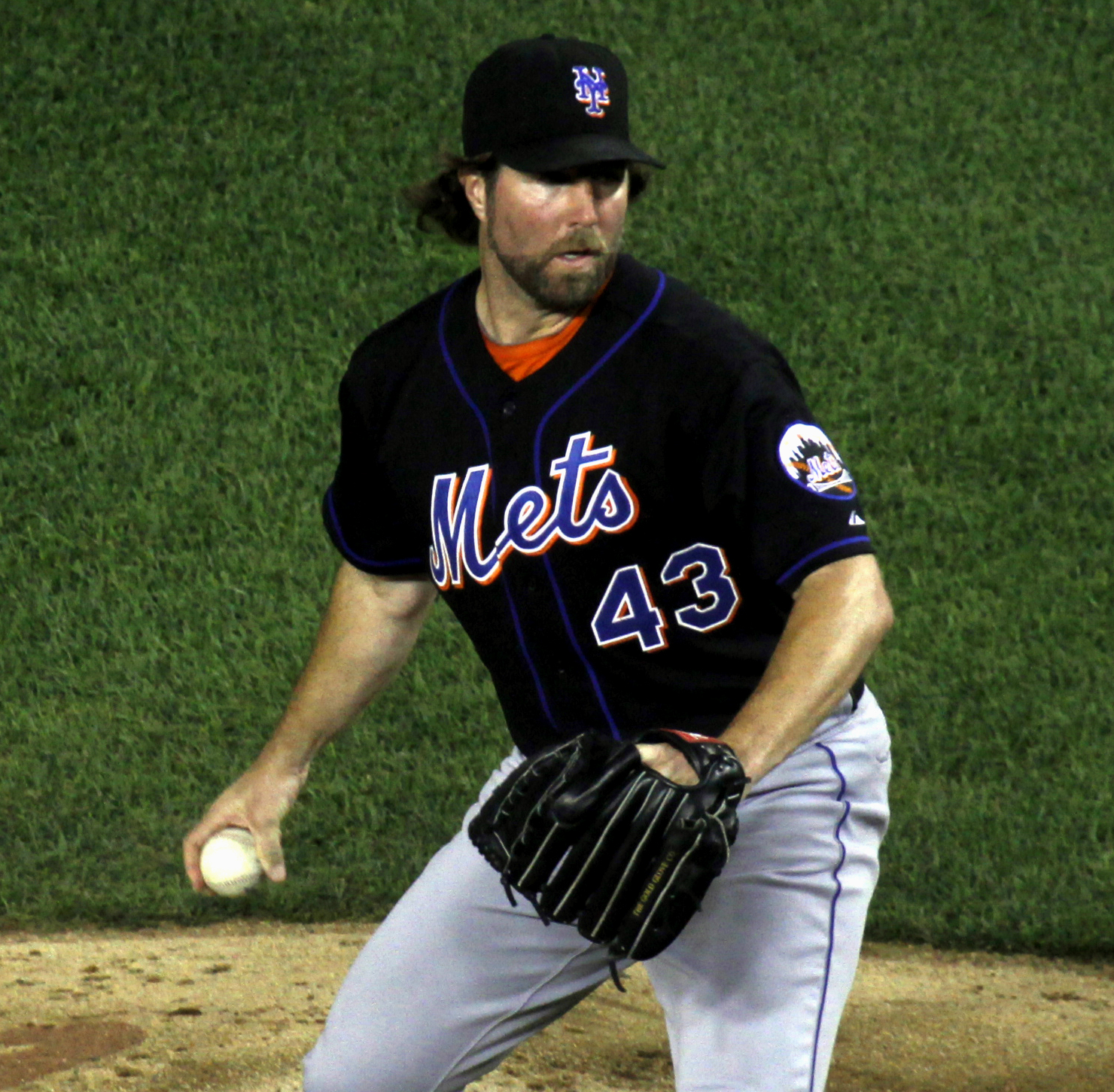 R. A. Dickey